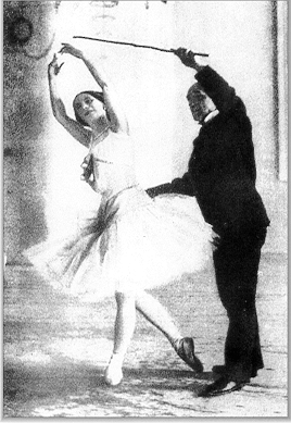 Cechetti enseignant Anna Pavlova, 1905-1906